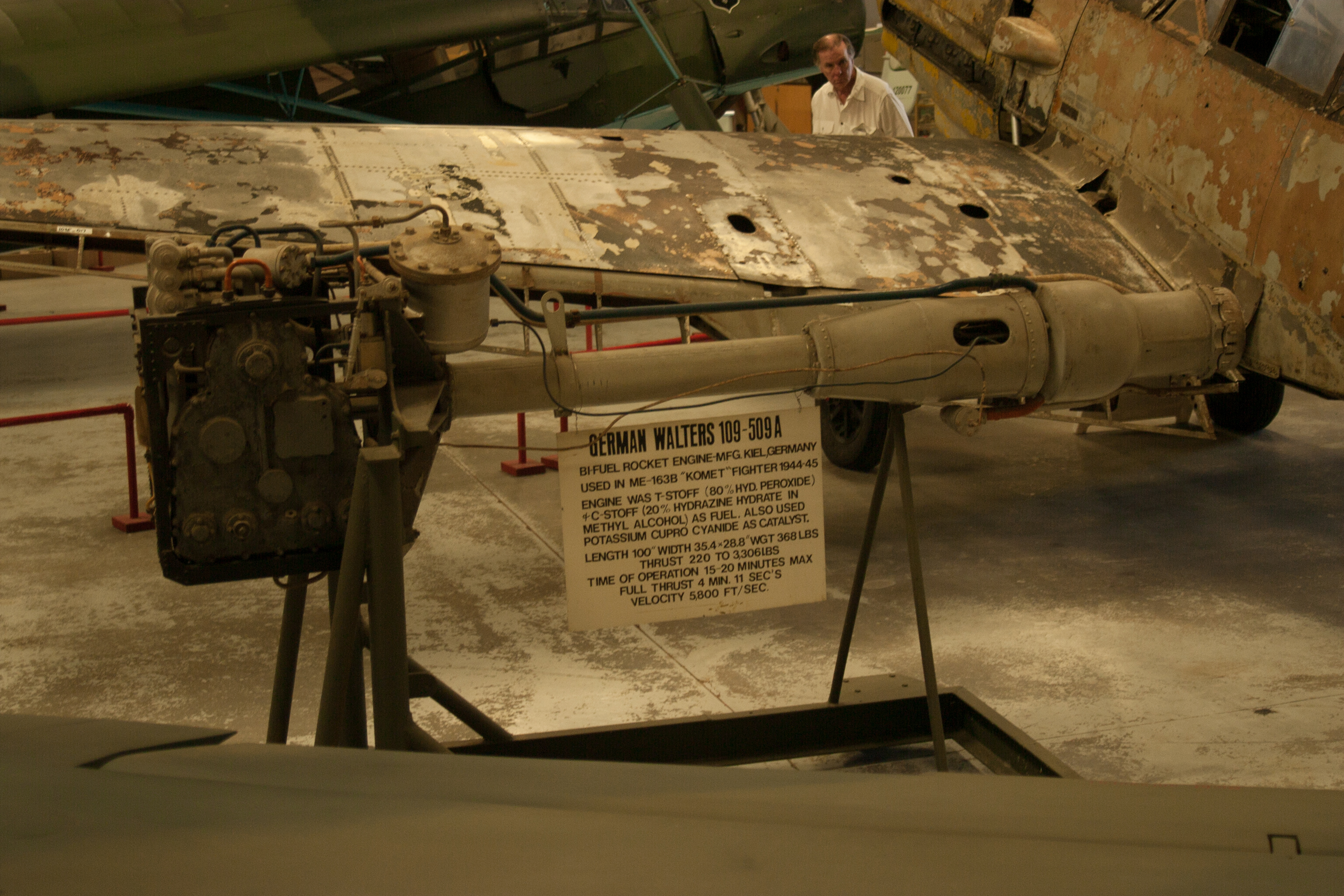 Walter HWK 109-509A Rocket Engine